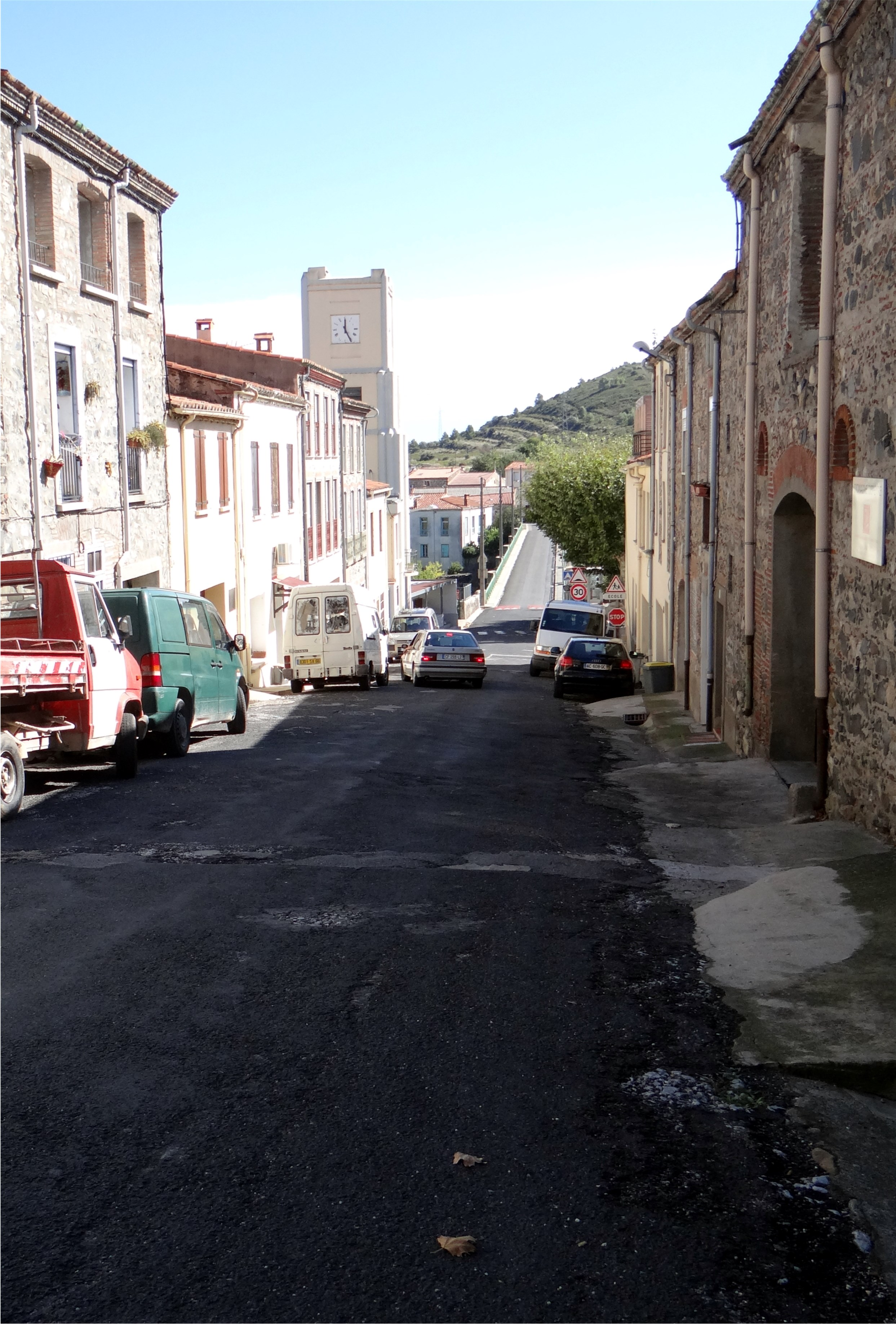 Avenue de l'hôtel de ville, Cases-de-Pène, Pyrénées-Orientales, France.